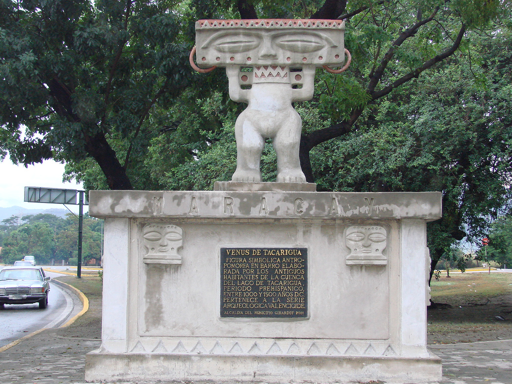 HOMENAJE A LOS TACARIGUAS. Maracay. Aragua. Venezuela (Indios Tacariguas)